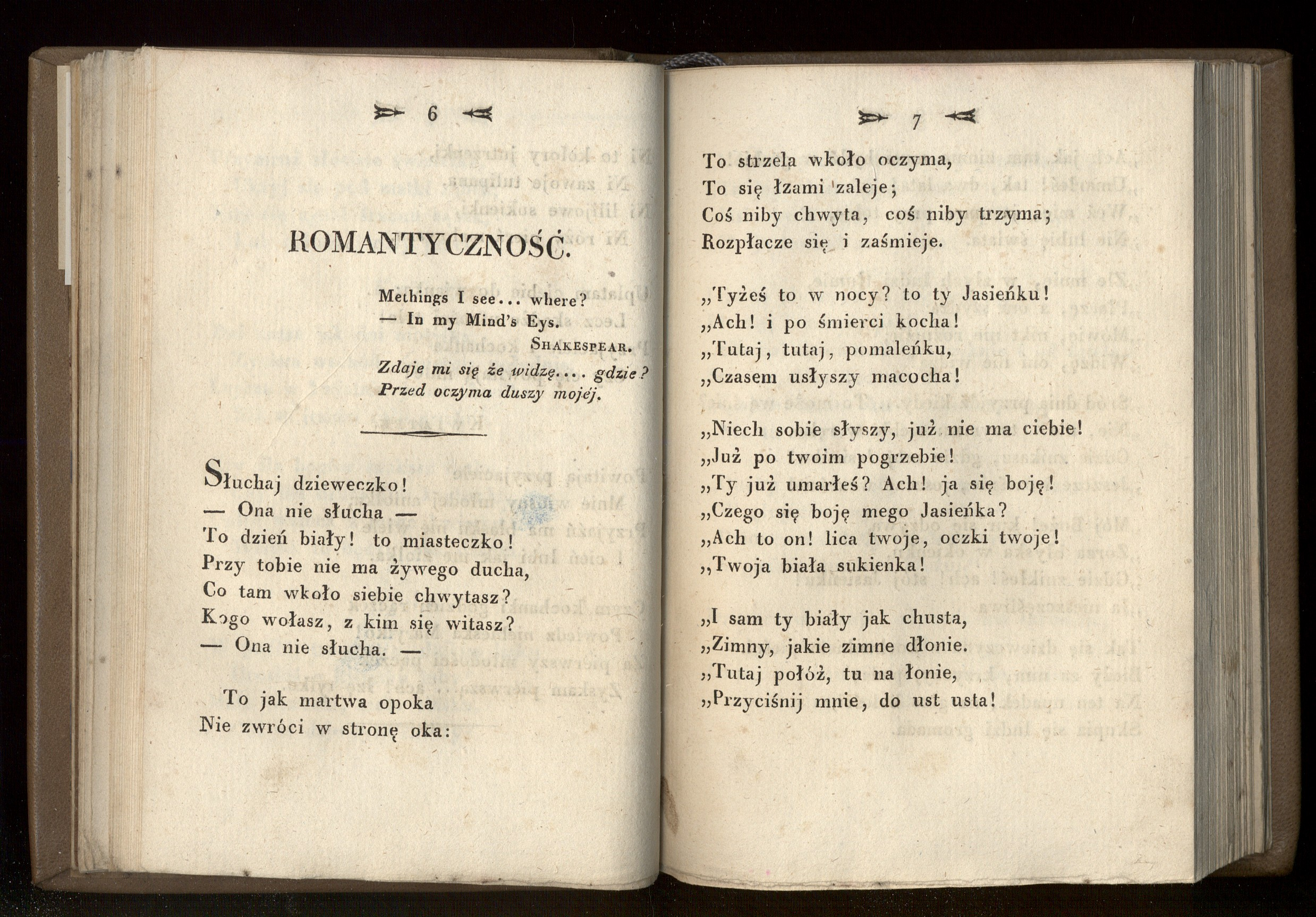 Fragment, wyd. 1823